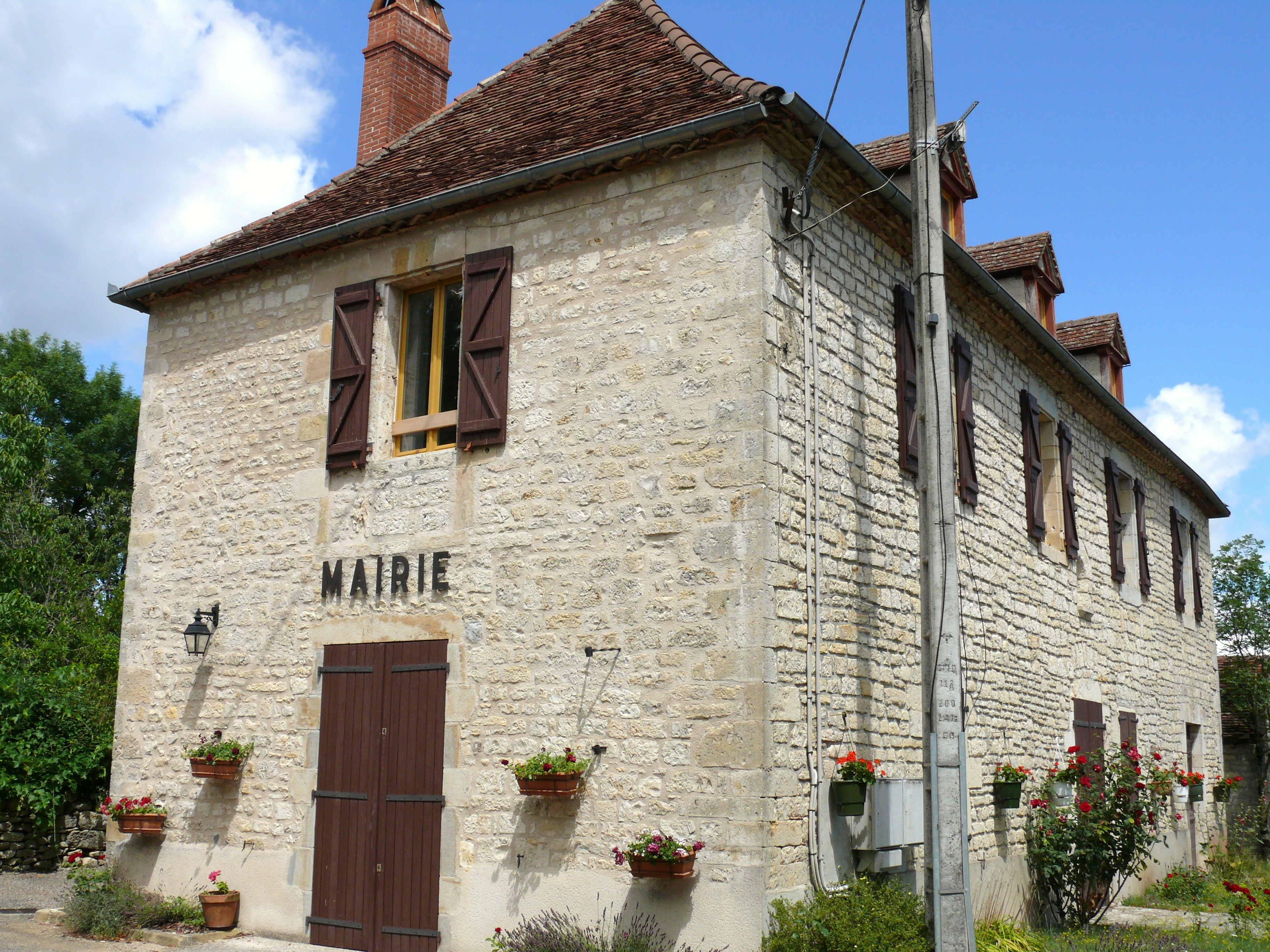 Séniergues - Mairie